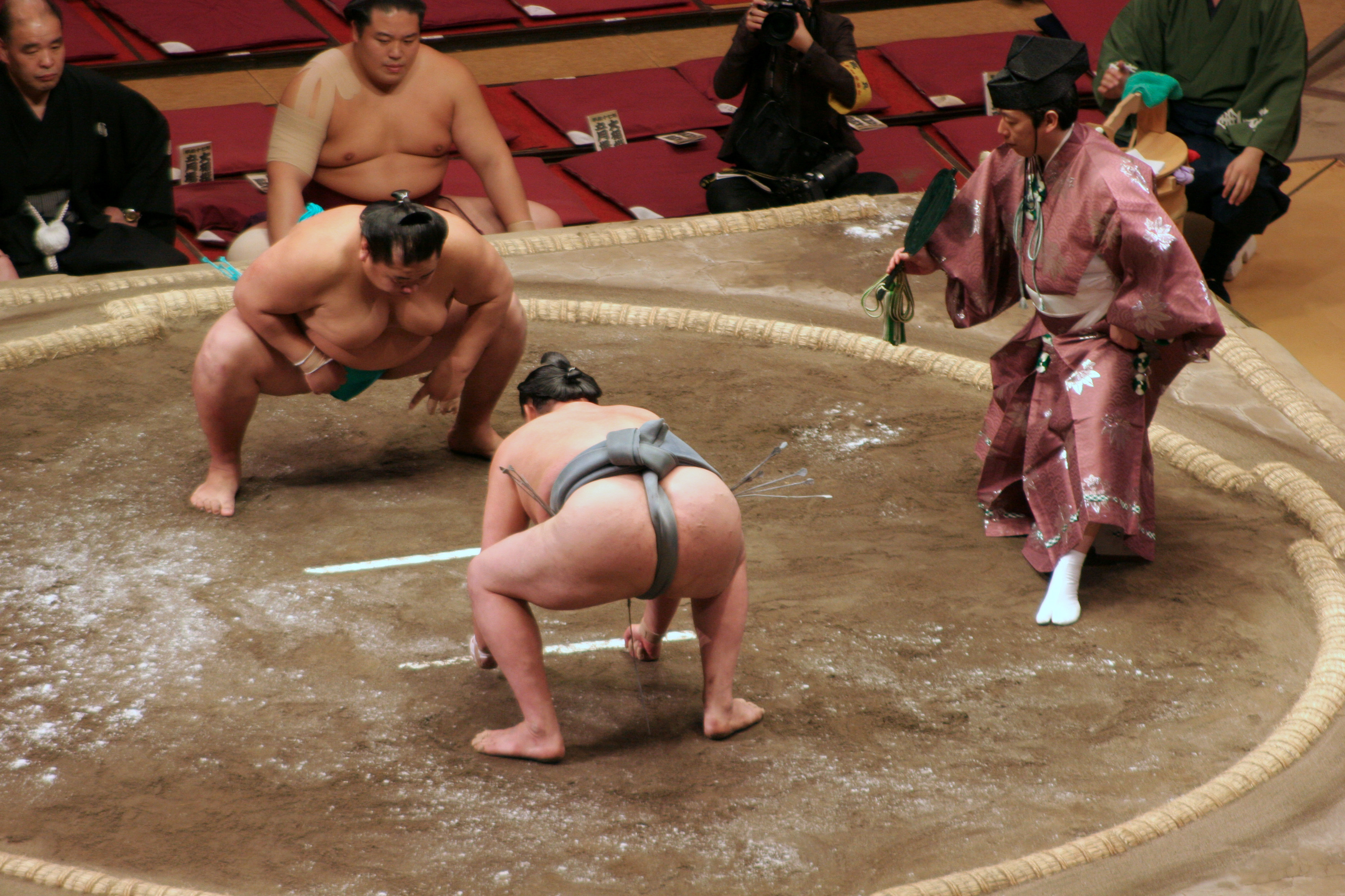 japon, tokyo, combat de sumo